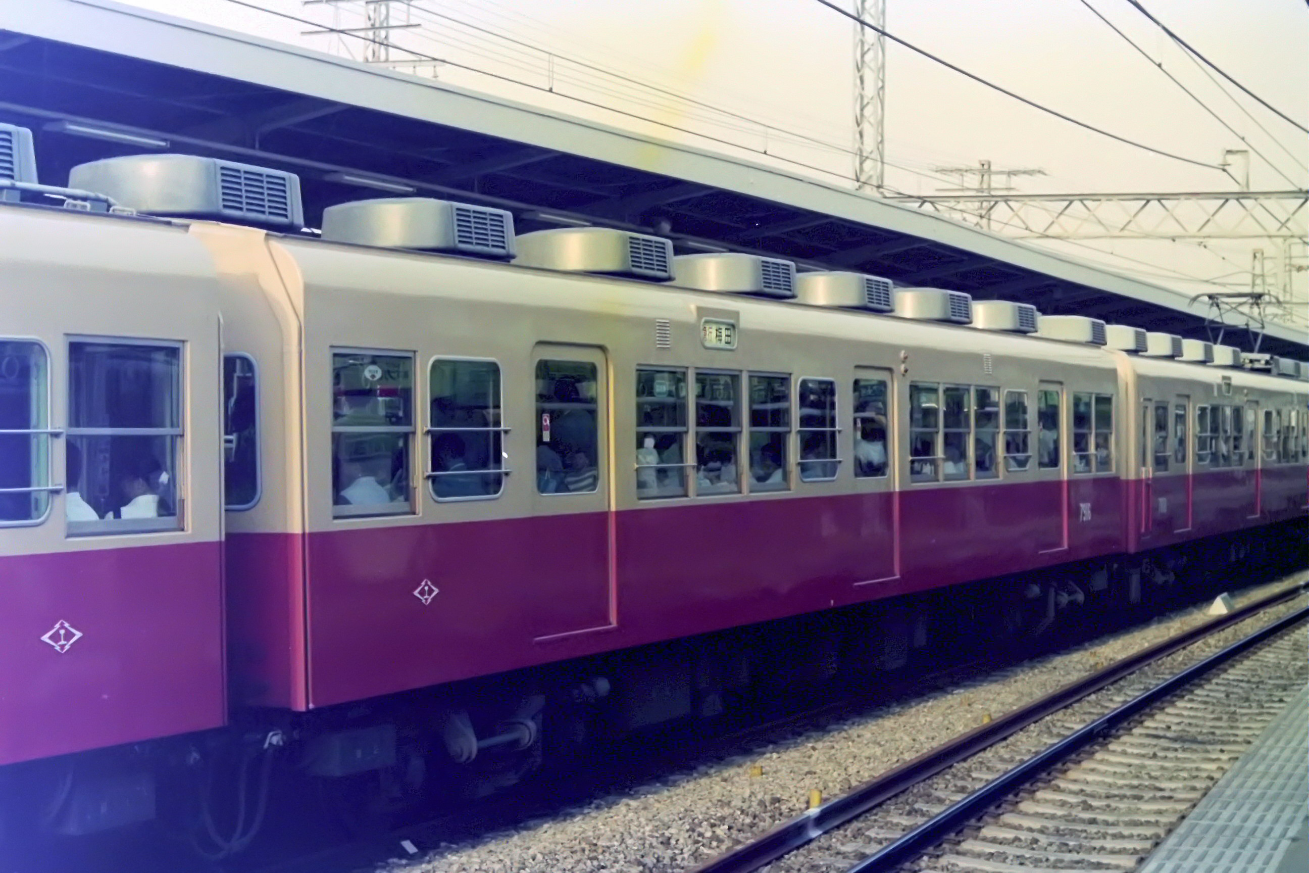 阪神電気鉄道 7916 尼崎駅